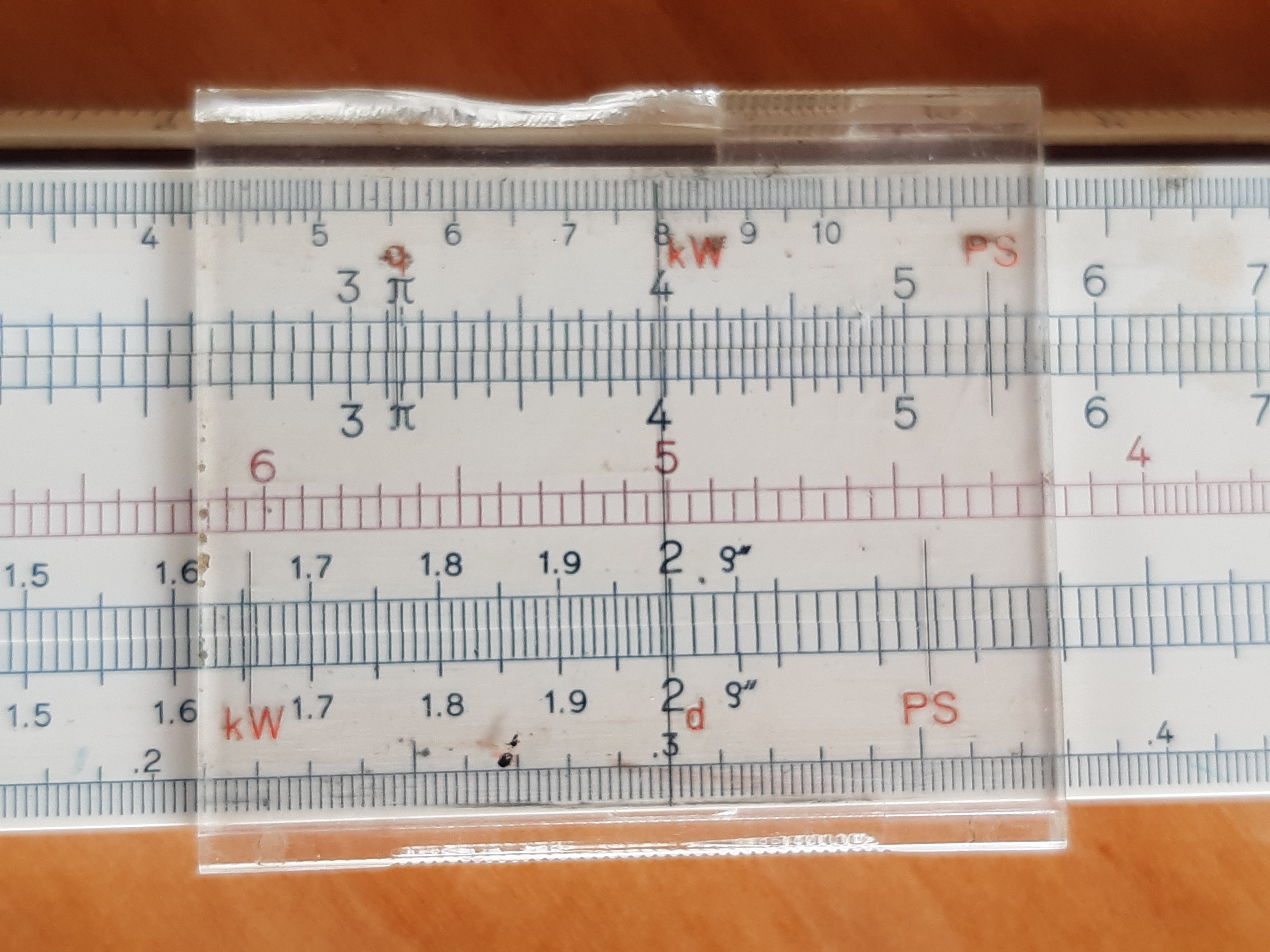 présentation autour de 2 des différentes échelles de la règle à calcul. De haut en bas, échelle des cubes, des carrés, des inverses, des X, des logarithmes décimaux